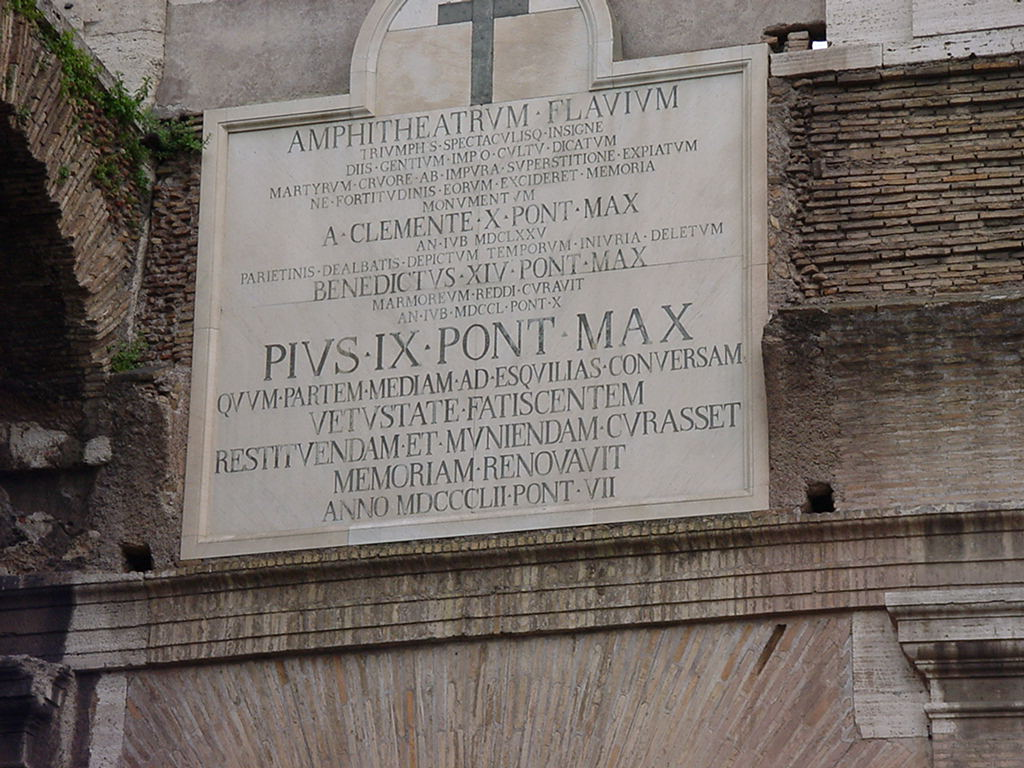 Inscrizione Anfiteatro_flavio Autore utente:DracoRoboter Self made